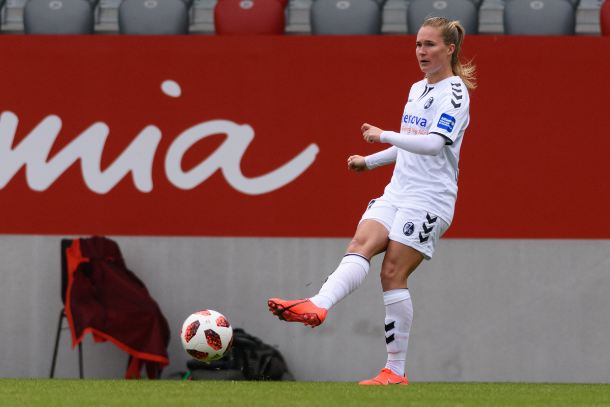 Desiree van Lunteren during FC Bayern (women) vs SC Freiburg (women), May 2019